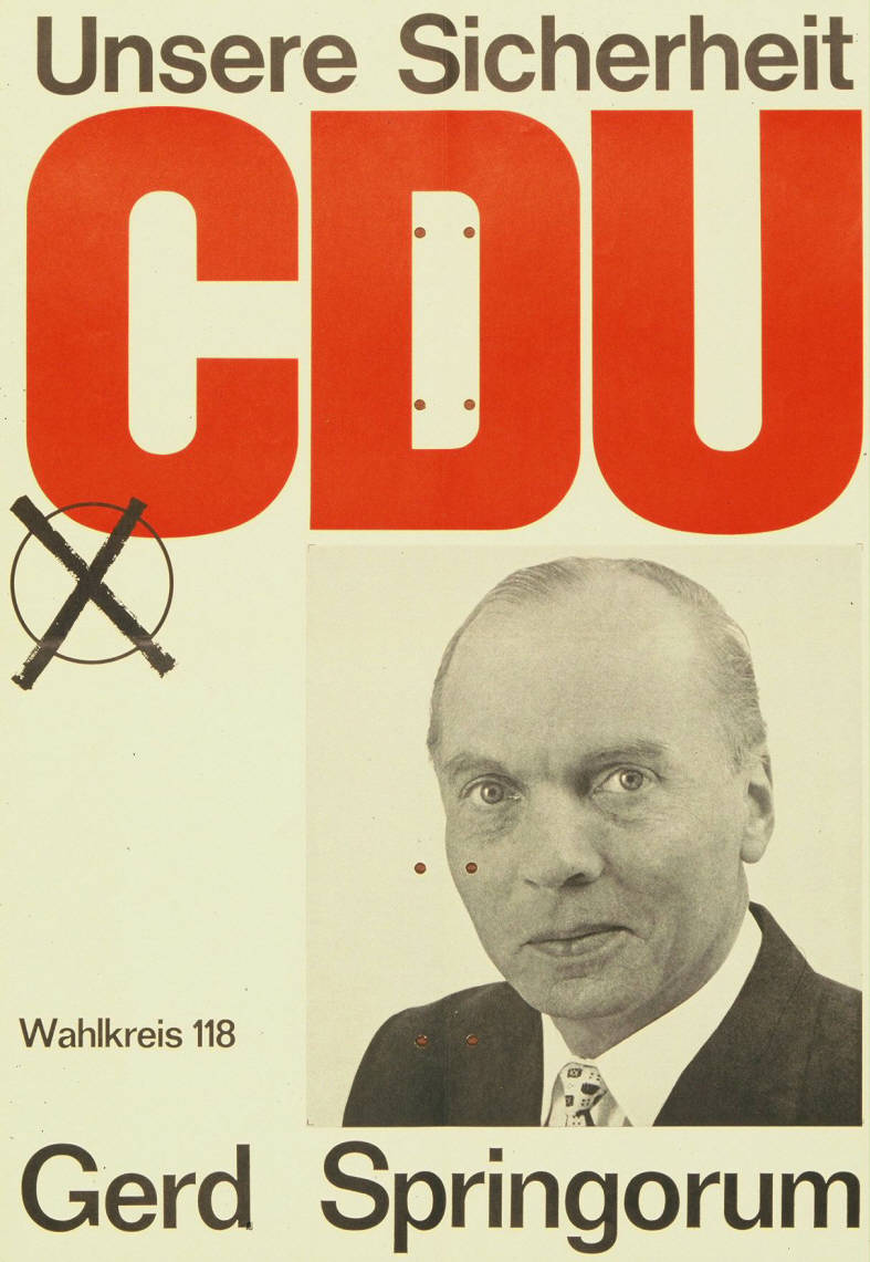 Unsere Sicherheit CDU Wahlkreis: 118 Gerd Springorum Abbildung: Porträtfoto - Stimmkreuz Plakatart: Kandidaten-/Personenplakat mit Porträt Auftraggeber: CDU Bonn Drucker_Druckart_Druckort: KVD Köln Objekt-Signatur: 10-001: 1221 Bestand: Plakate zu Bundestagswahlen (10-001) GliederungBestand10-18: Plakate zu Bundestagswahlen (10-001) » Die 5. Bundestagswahl am 19. September 1965 » CDU » Mit Porträtfoto Lizenz: KAS/ACDP 10-001: 1221 CC-BY-SA 3.0 DE